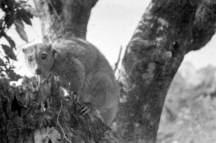 Negatief. Een Koeskoes (familie Marsupialia buideldieren) gevangen bij Kaslioe in het Moetisgebied op Timor